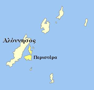 Η θέση της νήσου Περιστέρα στο χάρτη